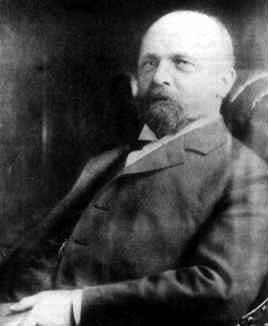 Fotografie des Mathematikers Heinrich Maschke